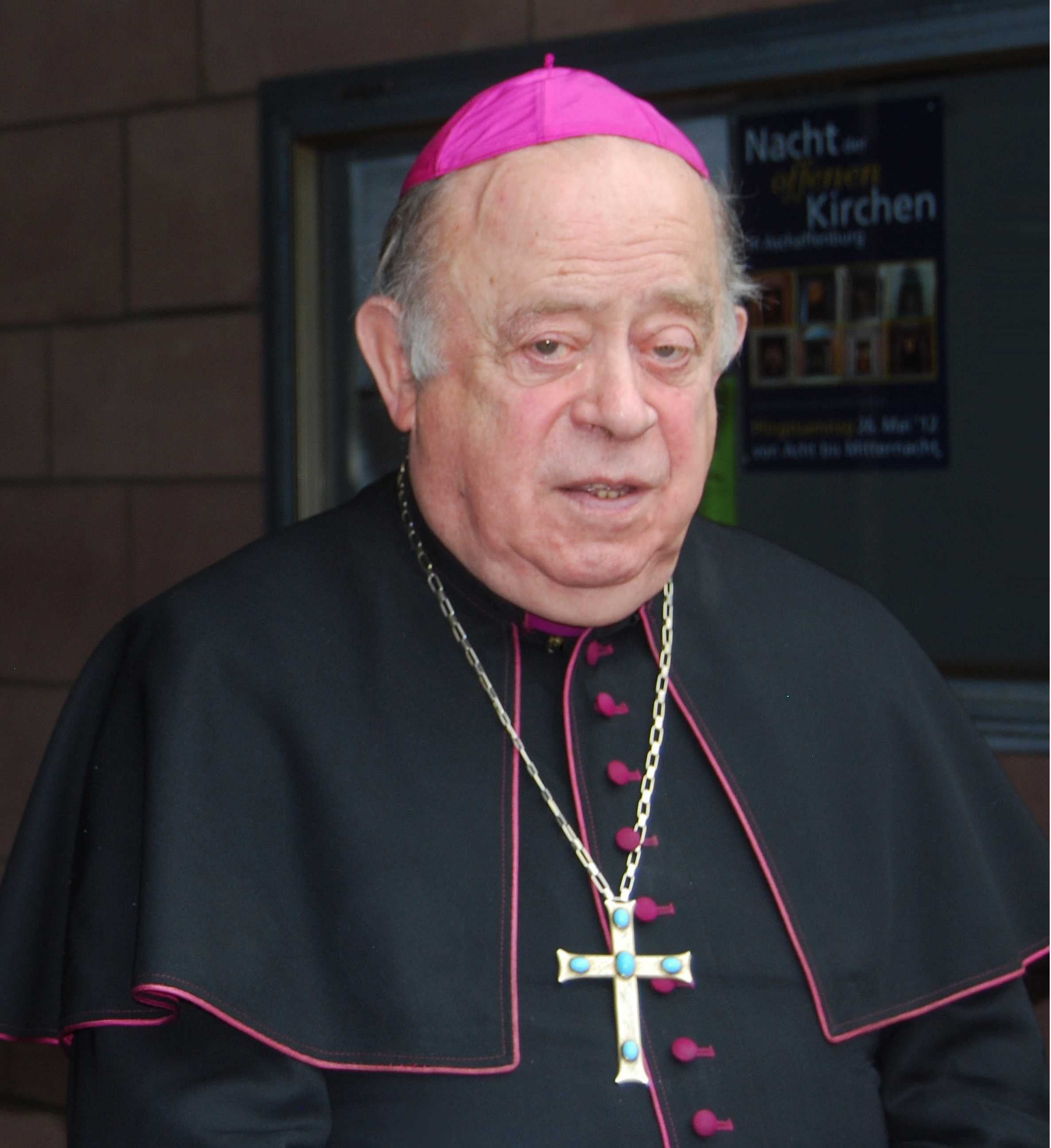 Paul-Werner Scheele em. Bischof von Würzburg am 2012-05-06 in Aschaffenburg-Obernau